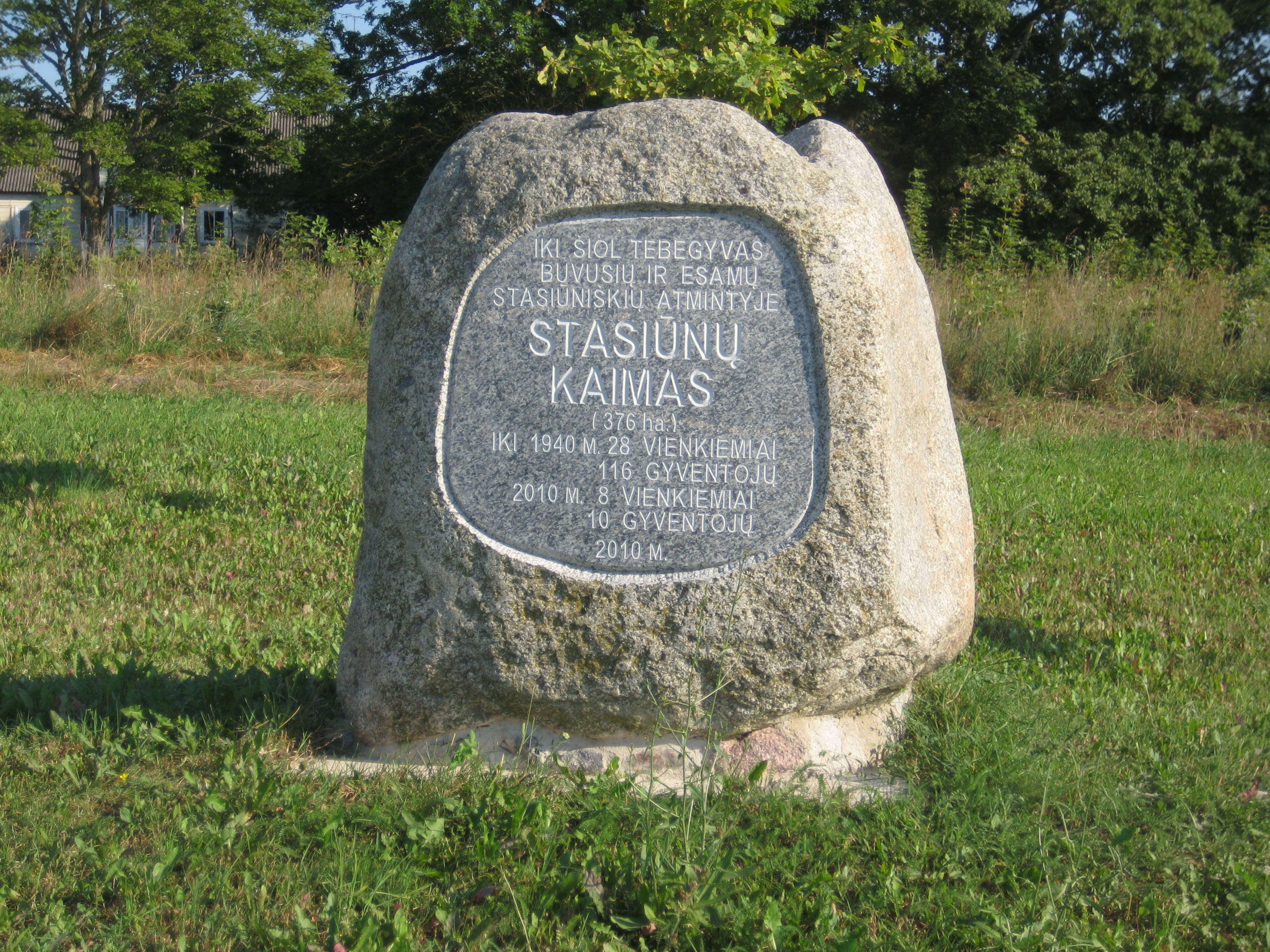 Obelių sen., Lithuania